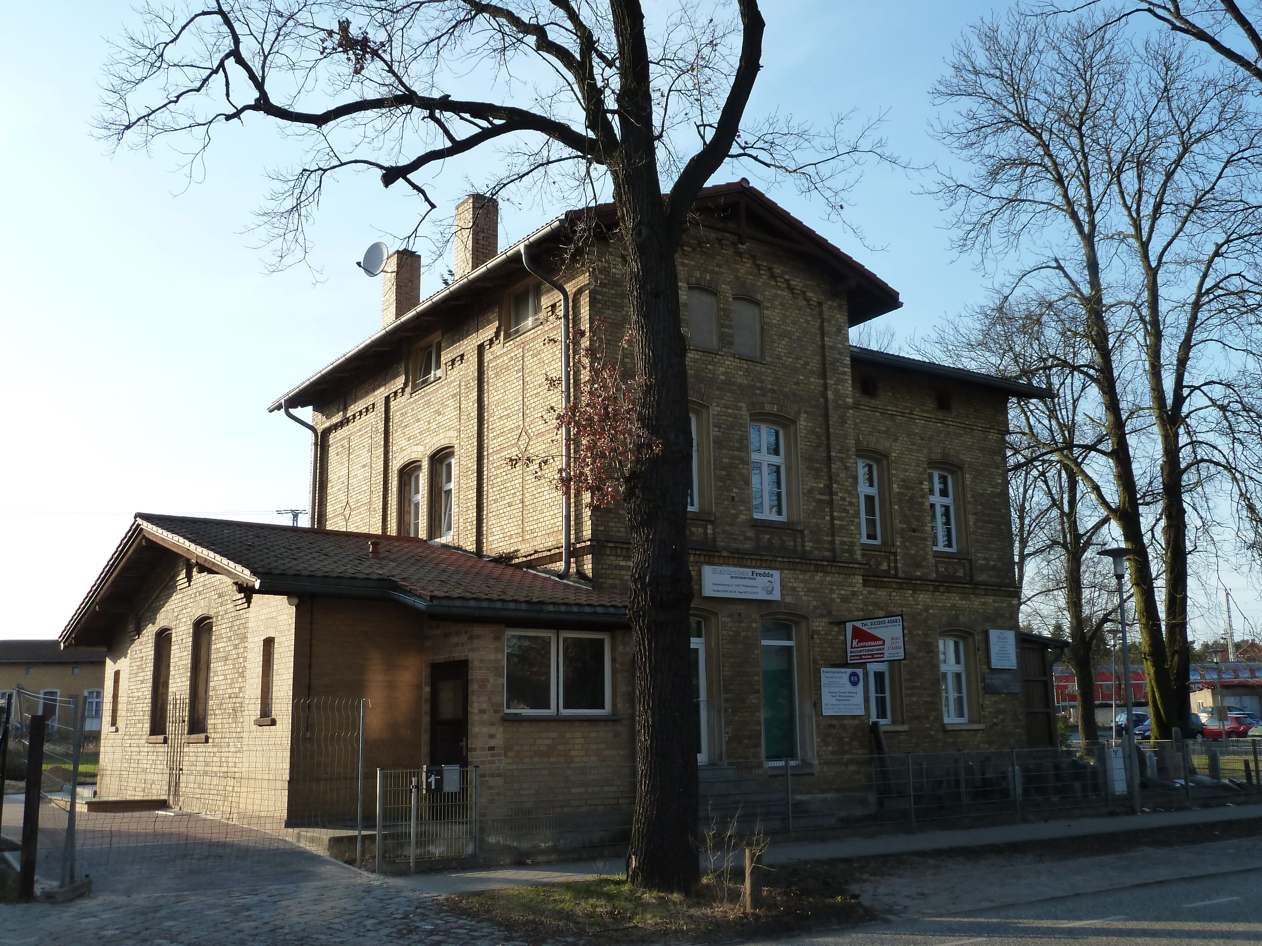 Eisenbahnerwohnhaus in Michendorf, Potsdamer Straße 1, Kulturdenkmal.